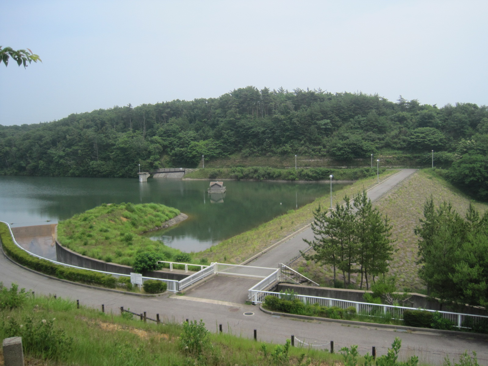 アリス館志賀のそばにある大坪川ダム。ロックフィルダムで、志賀原子力発電所で使用する工業用水用のダムである。